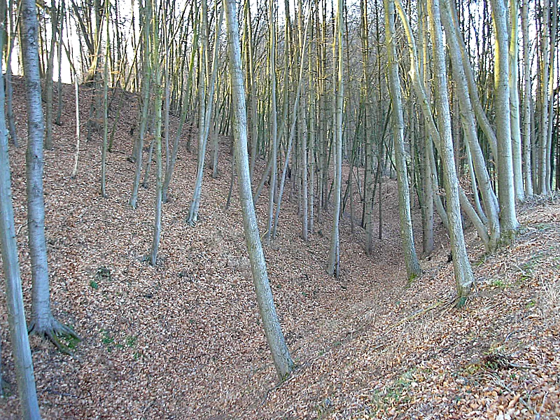 Burgstall Sand (Todtenweis, Landkreis Aichach-Friedberg, Bayerisch-Schwaben). Der Wallgraben nach Nordwesten. Eigene Aufnahme, Jan. 2008 / Former Sand castle (Todtenweis, Landkreis Aichach-Friedberg, Bavaria, Germany). The moat, looking north west. Own photo, Jan. 2008